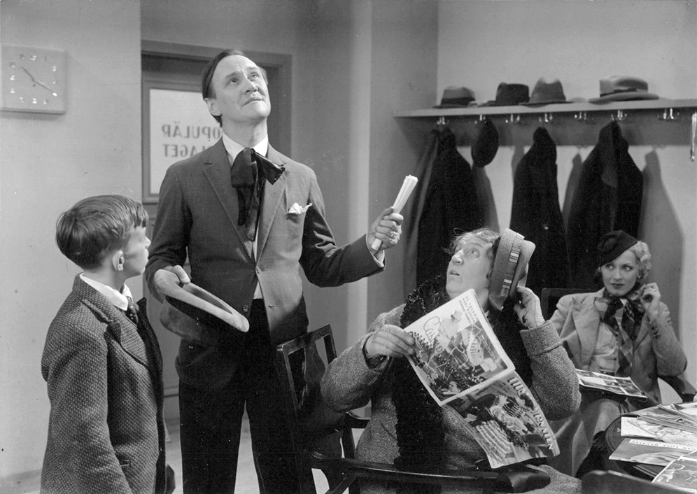 "Han, hon och pengarna". Gösta Gustafson och Julia Cæsar